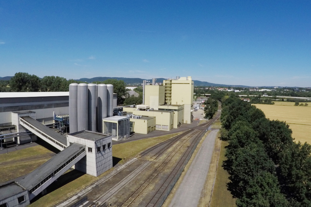 Kraftwerk Kassel: Block des Kombi-Heizkraftwerkes (Kombi-HKW), Dennhäuser Straße, Kassel